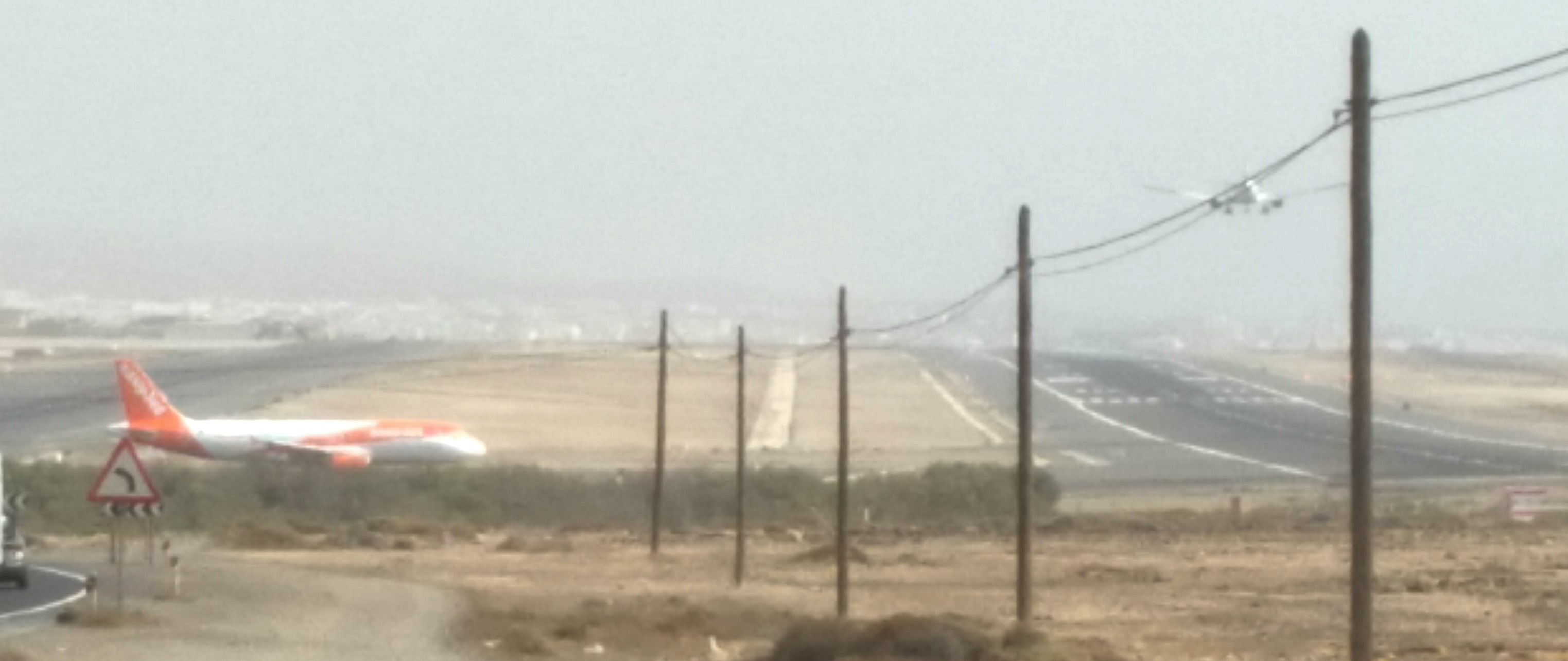 Aéroport Fuerteventura Avion en attente decollage pendant qu' un autre atterrit